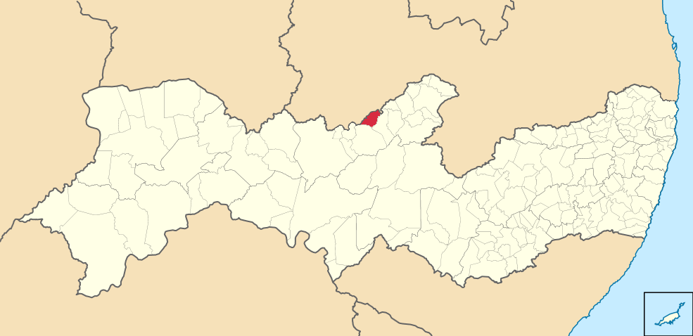 Mapa de Quixaba (2)